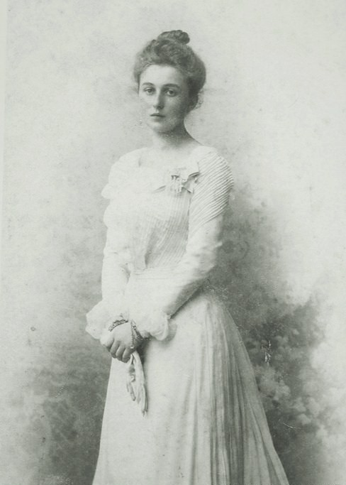 Графиня Марина Александровна Голенищева-Кутузова (1880-1927), в браке графиня Граббе.